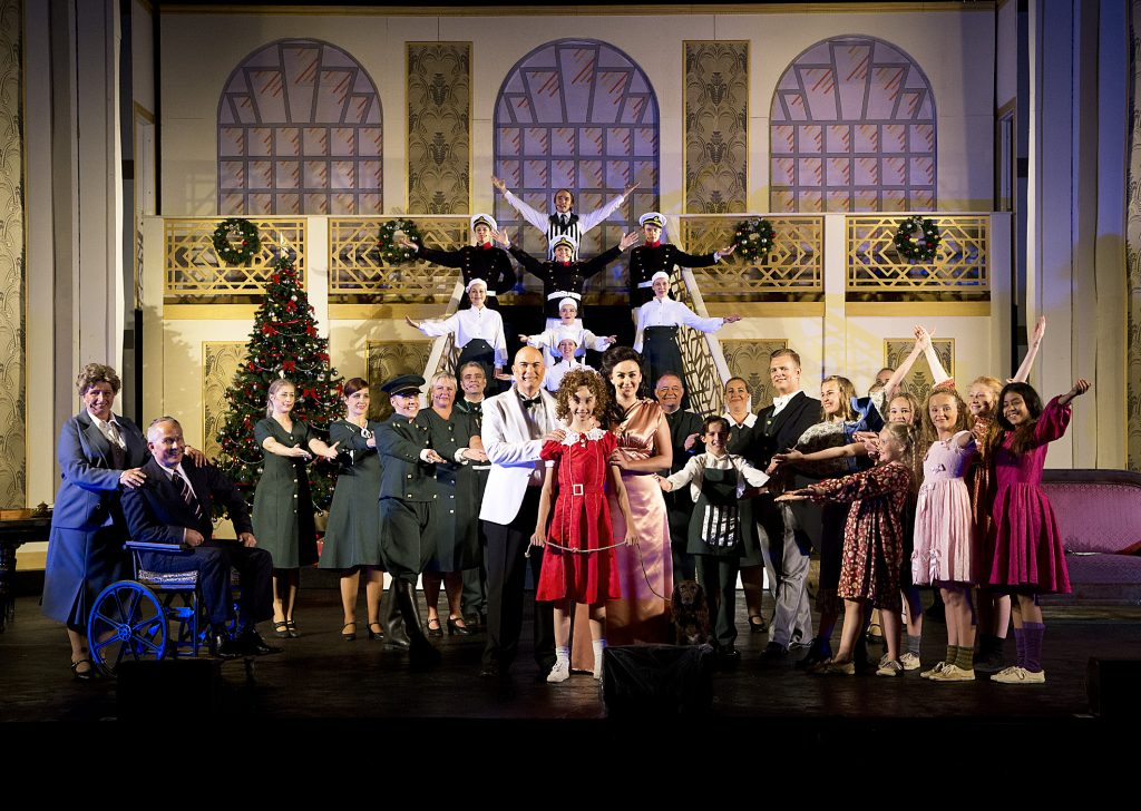 Dette er et billede fra Palsgaard Sommerspils opsætning af musicalen 'Annie', 2017